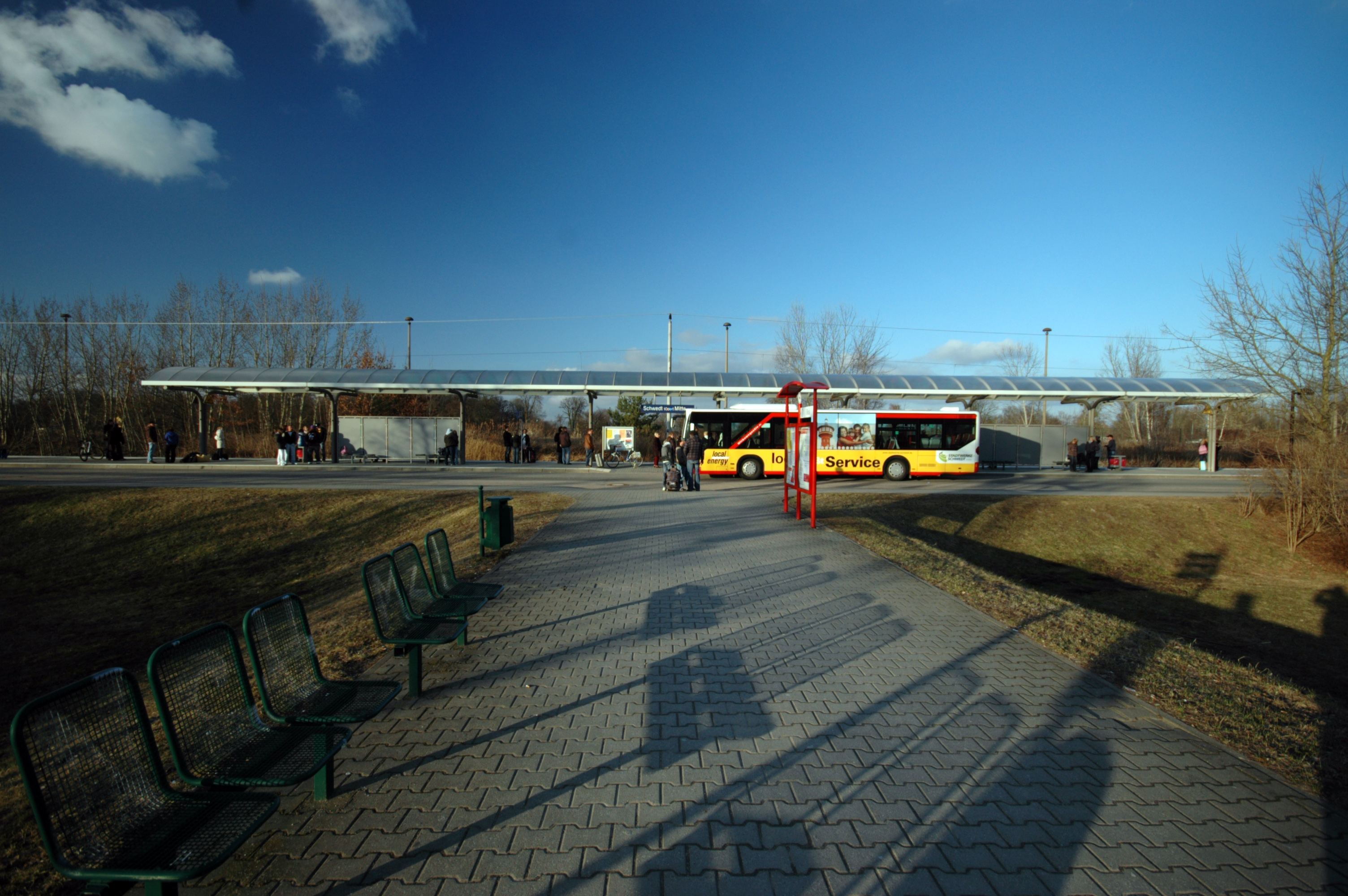 Schwedt